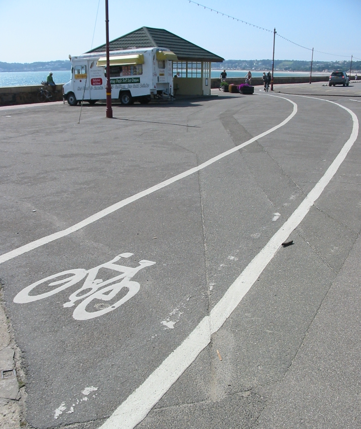 Nrf: Saint Hélyi, Jèrri, 17 dé Juîn 2009